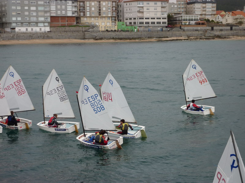 Regata Optimist, Ribeira